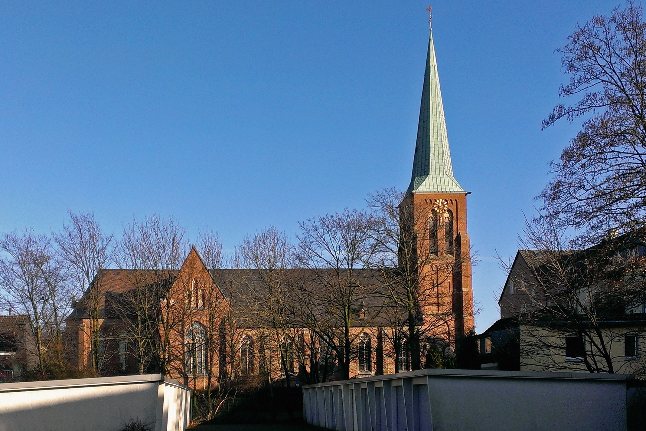 St.-Josef-Kirche in Essen-Frintrop, Ansicht von Süden